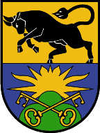 Schruns, Vorarlberg: Ein von Gold über Blau erhöht geteilter Schild. In dem oberen Felde erscheint ein aufspringender schwarzer Stier mit gesenktem Kopfe. Aus dem Fußrande des unteren Feldes erhebt sich ein mit zwei gekreuzten goldenen Schlüsseln belegter grüner Dreiberg, hinter dem eine goldene Strahlensonne zu sehen ist. (Verleihung: 10. Dezember 1927)